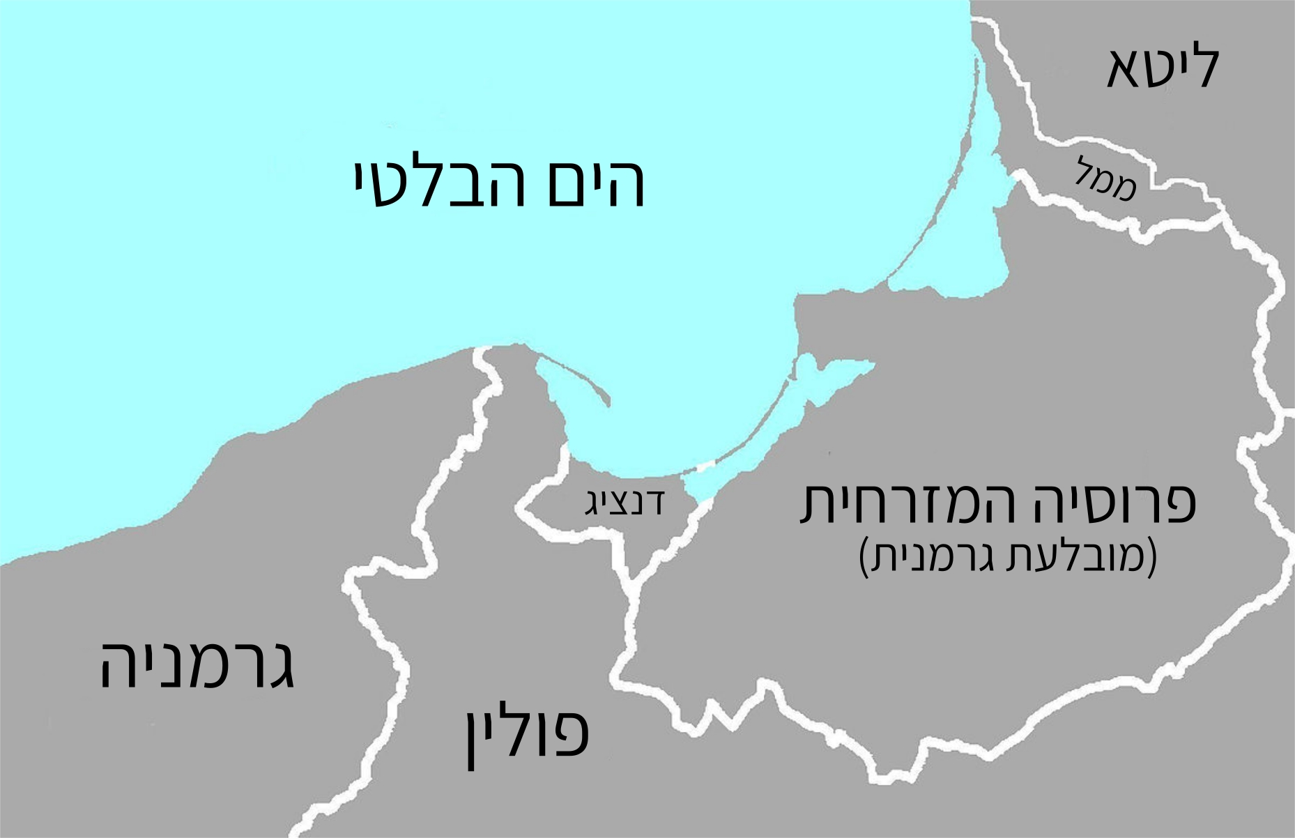 מפרץ דנציג בין שתי מלחמות העולם